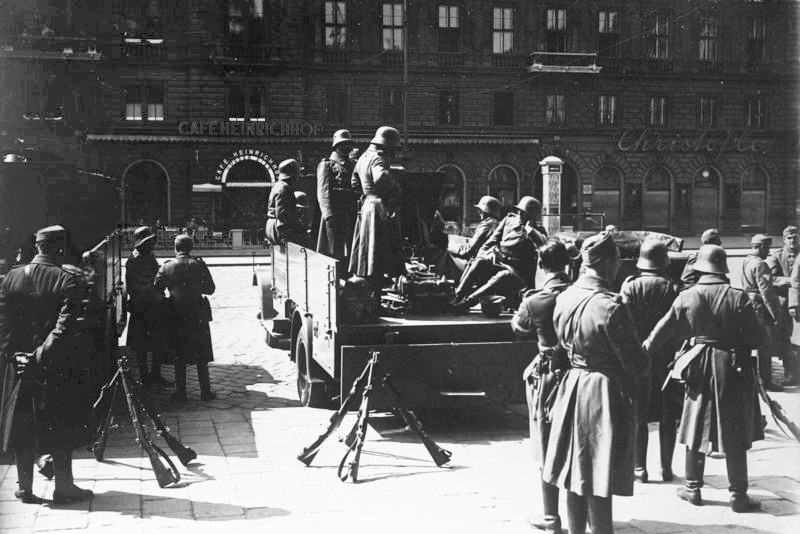 Die blutigen Kämpfe in Wien am 12. Februar 1934. Soldaten des Bundesheeres vor dem Hauptbahnhof. Information added by Wikimedia users.Korrektur zur Originalbeschreibung: nicht „vor dem Bahnhof“, sondern vor der Staatsoper, das Cafe Heinrichhof gegenüber.